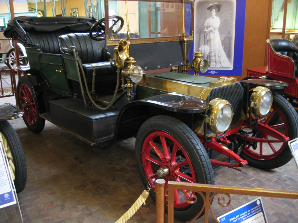 Peugeot Type 81 Double Phaéton